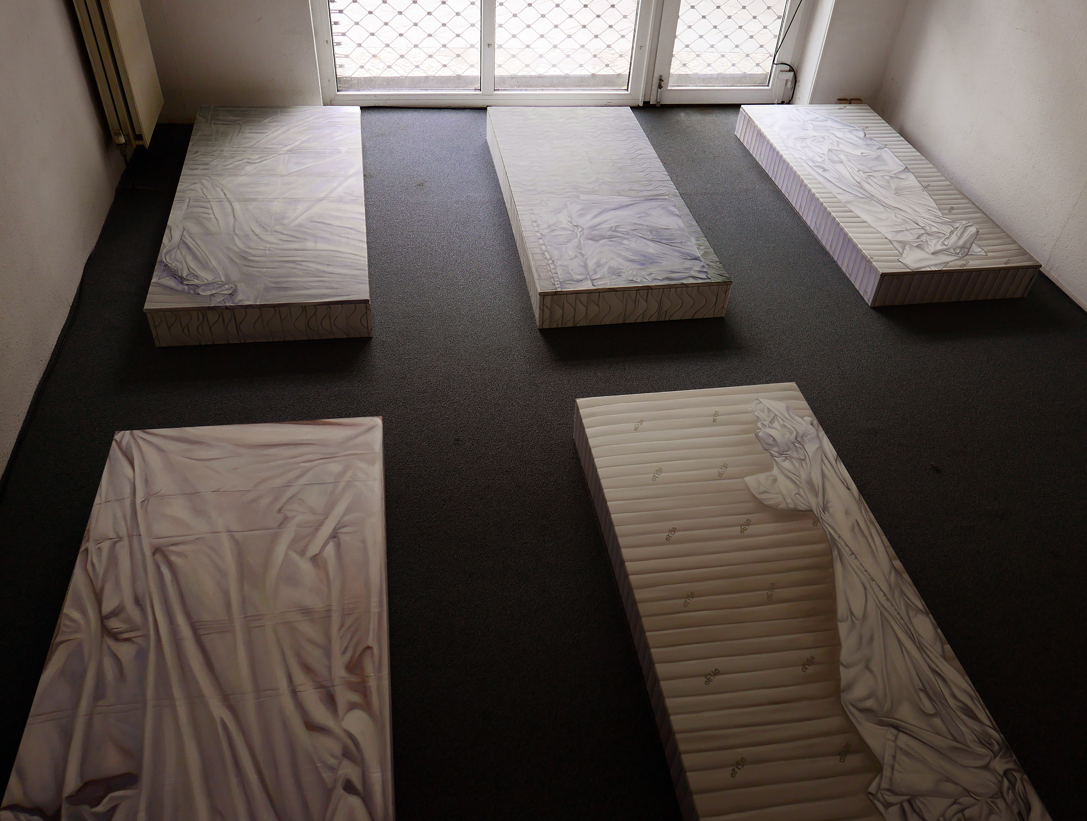 Die Rauminstallation „Room Number 1“ beinhaltet sechs Objekte, die wiederum jeweils aus fünf Ölgemälden bestehen. Die bemalten Leinwände zeigen Oberflachen von Matratzen und Laken und wurden in entsprechender Größe und Ausmaß aufgespannt und zusammengefügt. Der gezeigte Gegenstand, die Matratze, wird hierbei nicht nur durch die Möglichkeiten der Ölmalerei dargestellt, sondern in einem zweiten Schritt auch dreidimensional nachgebildet. Hierbei verschwimmt die Grenze zwischen Malerei und Plastik und hinterlässt ein eigenständiges Objekt, das sich nur auf den ersten Blick als Imitat darstellt. Die Installation wurde 2016 in einem leerstehenden Ladenraum in einem Viertel von Berlin Neukölln gezeigt, das vielerorts als sozialer Brennpunkt gilt. „Room Number 1“ greift thematisch die Umgestaltung und Nützung von leerstehenden Räumen im urbanen und sozialen Umfeld auf und eröffnet durch die Errichtung einer „Schlafstätte“ eine in verschiedene Richtungen offene Lesbarkeit.